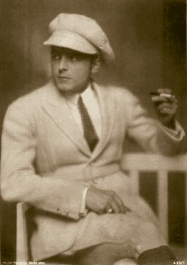 Schauspieler Ernst Hofmann auf einer Fotografie von Nicola Perscheid